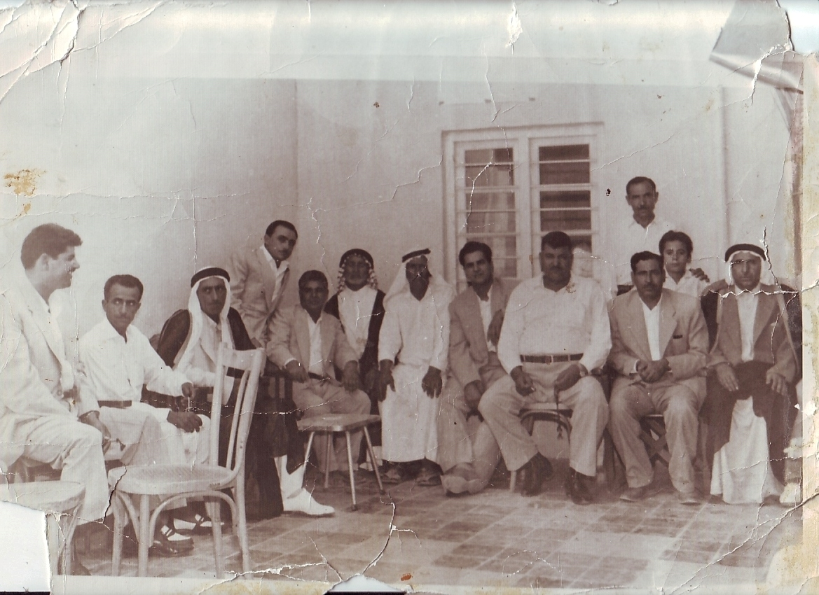 صورة تمثل وجهاء الفاو مع موظفي الناحية ويظهر فيها من اليسار غضبان الكبيسي ، قاسم عيسى العطيوي ، الحاج عبد عثمان ، وأثنان من موظفي الناحية ، الحاج درويش نعيمه التميمي ، الحاج عبدالعزيز ياسين الطوب ، الحاج عبود محمد خليفة ، الحاج عودة الكبيسي ، ومدير ناحية الفاو، والصغير االباحث محمد عبدالحسن الرماثي ،ووالده الحاج عبدالحسن الرماثي سحبت هذه الصوره سنة 1960